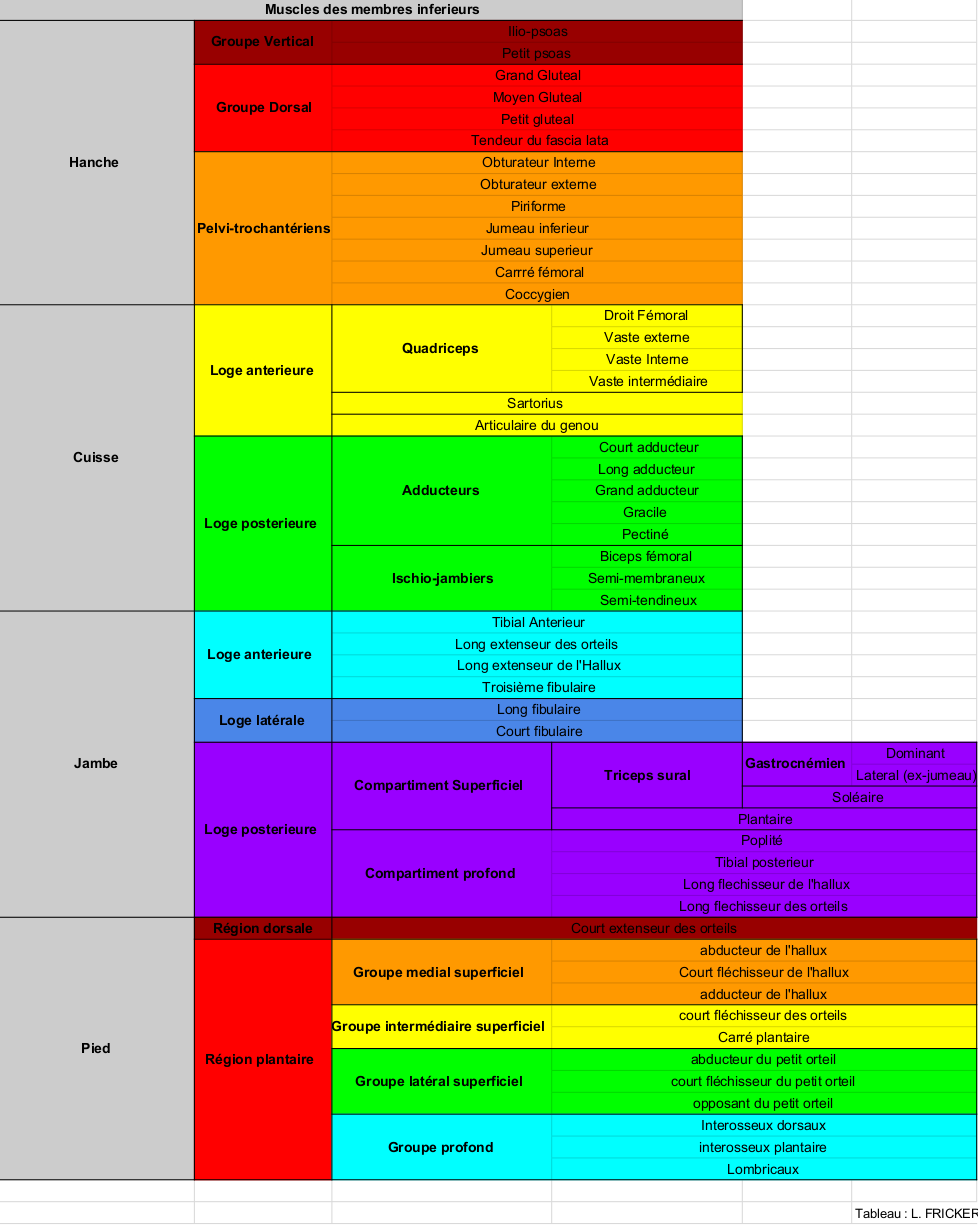 Tableau récapitulatif des muscles des membres inférieurs chez l'homme